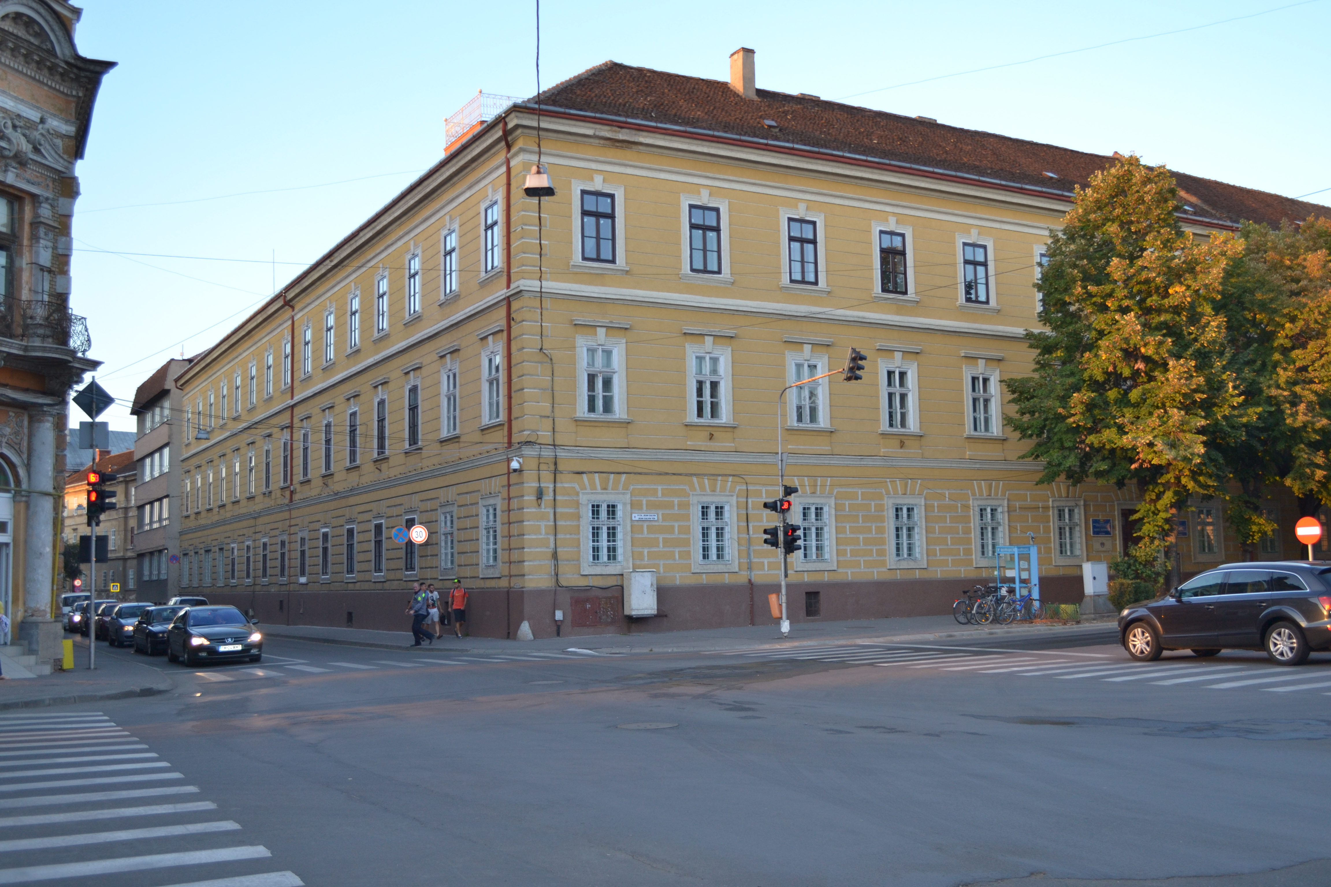 Liceul "Kölcsey Ferenc